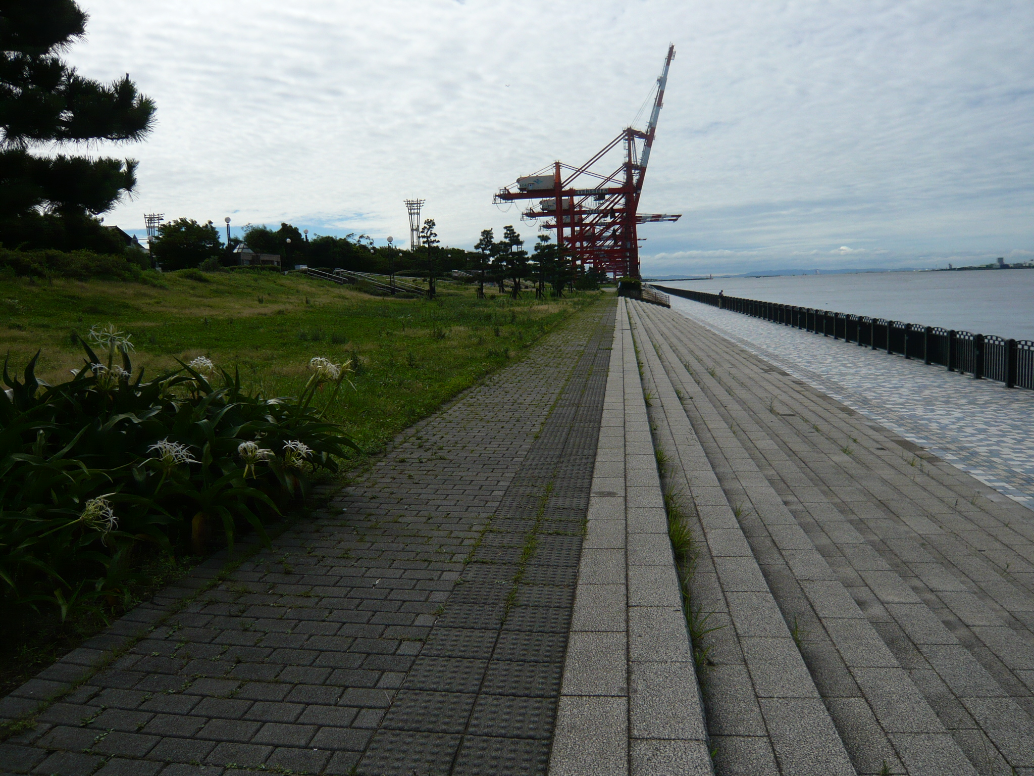 Aomi Minami Port Park (Aomi-Minami-Futou-Kouen) in Koto-ku, Tokyo, Japan.